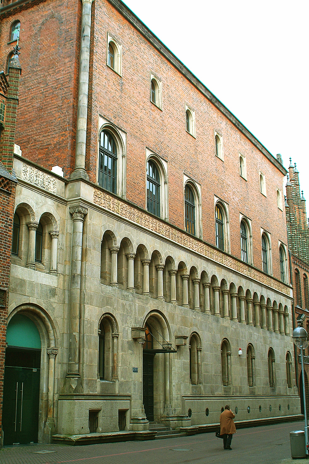 Stadtbaumeister August Heinrich Andrea: Altes Rathaus in der Altstadt von Hannover mit Gefangenhausflügel (1839 - 1841) im Hof und Gerichtsflügel (sog. "Dogenpalast", 1845 - 1850, heute u.a. Standesamt) anstelle der alten Ratsapotheke in der Köbelinger Straße